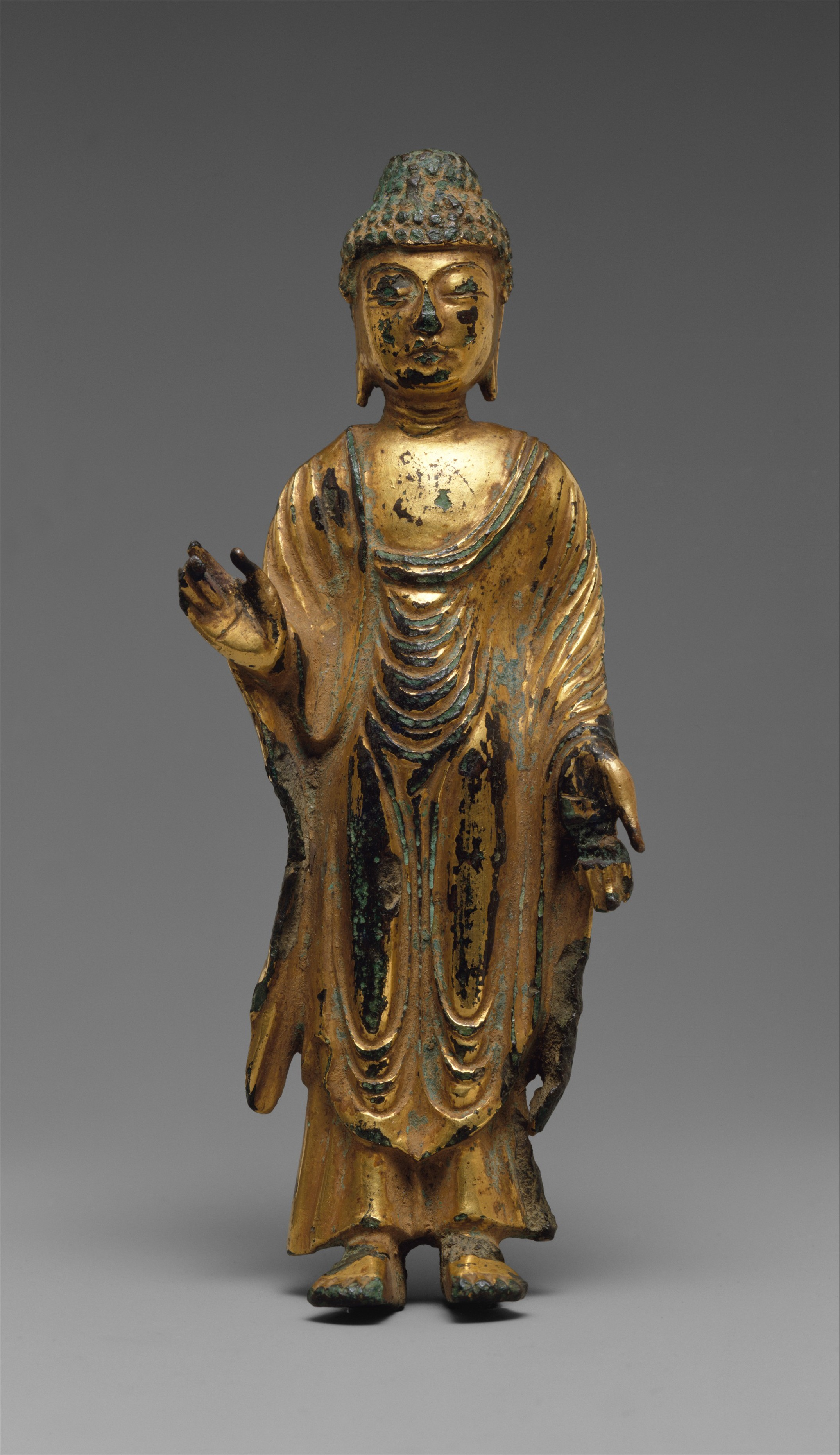 Korea; Statuette; Sculpture